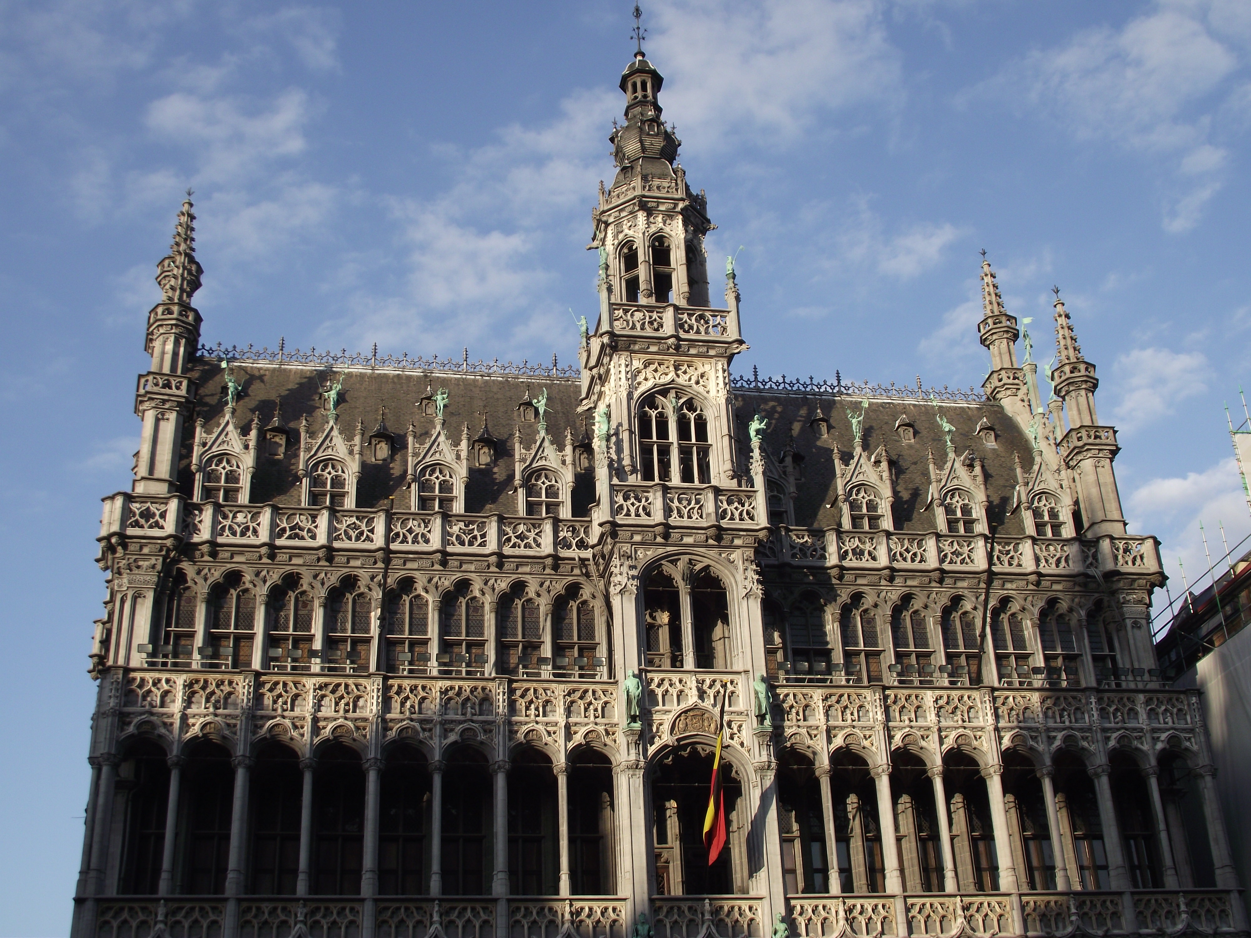 Bruxelles, Maison du Roi, Antoon II Keldermans 1515-36